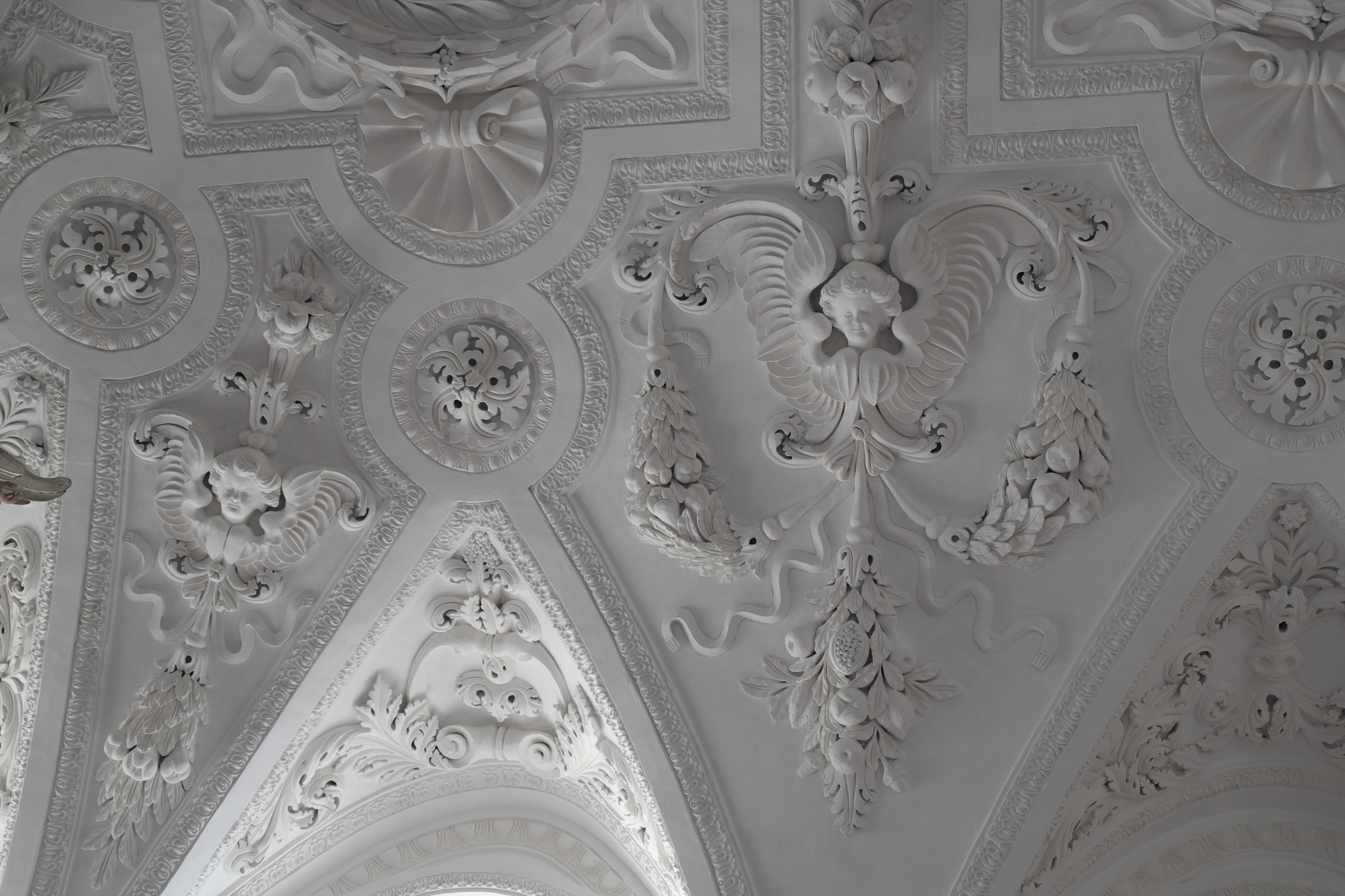 Katholische Filialkirche St. Georg in Pfaffenhofen, einem Ortsteil von Jesenwang im Landkreis Fürstenfeldbruck (Bayern/Deutschland), barocker Stuckdekor